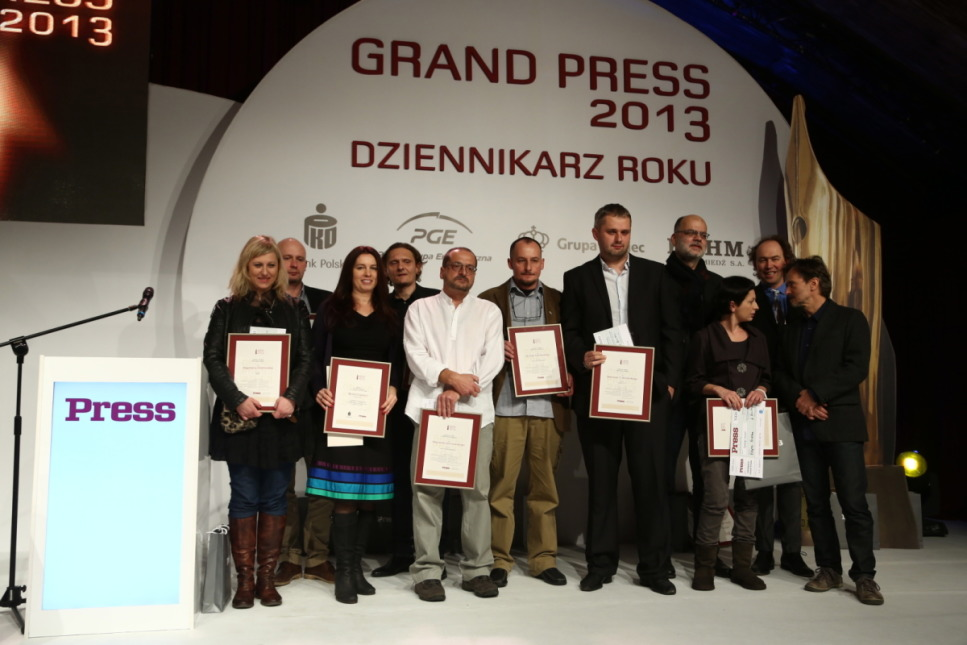 Photo of winners of the Grand Press, the most prestigious journalism award in Poland.